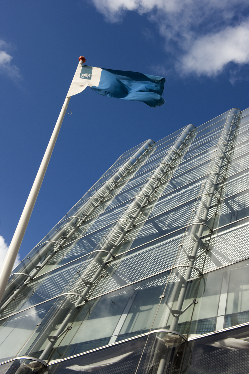 Gebouw van de Rijksdienst voor het Cultureel Erfgoed. Smallepad 5 te Amersfoort